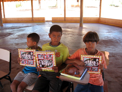 Participantes do projeto sanitaristas mirins da reserva Xacriabá em São João das Missões